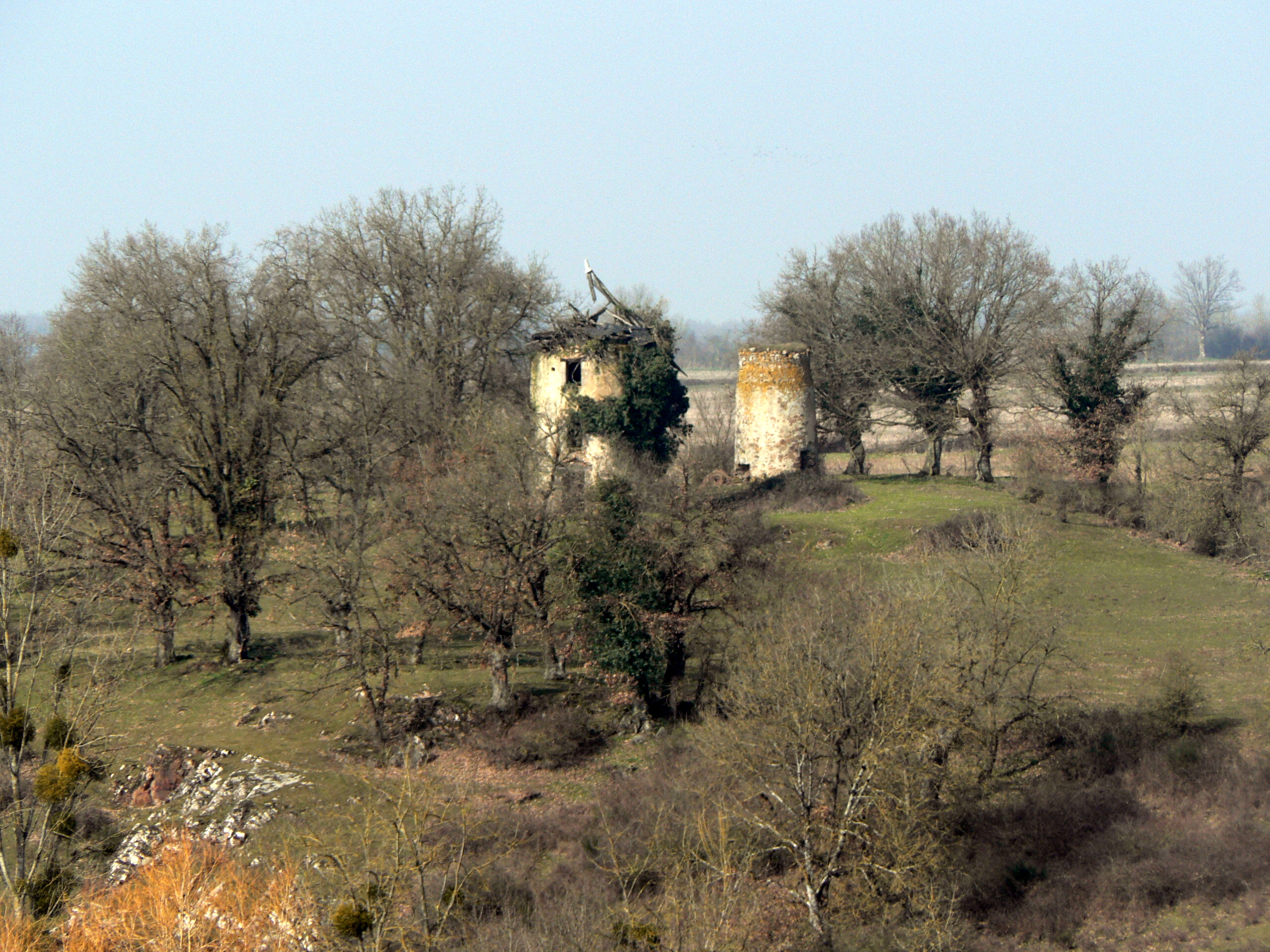 Moulins en Ruine situé à Glenay (79)